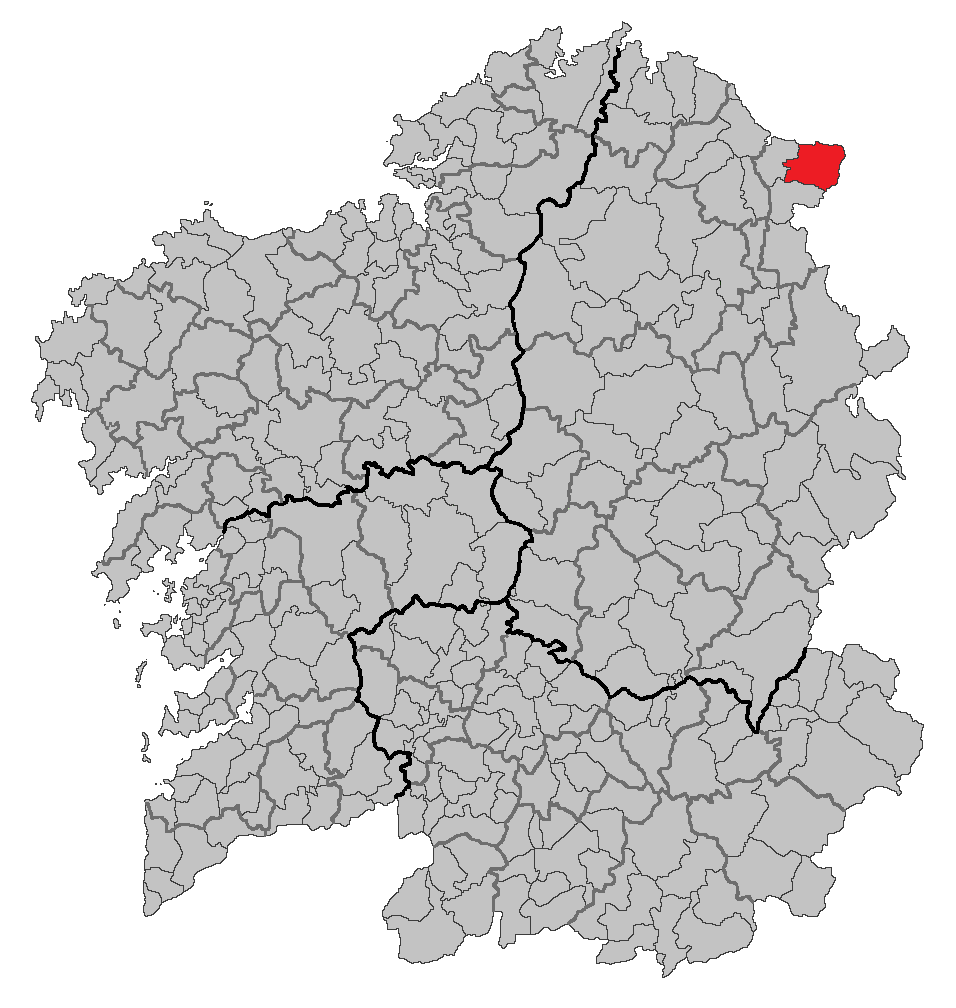 Mapa coa localización do concello de Ribadeo.